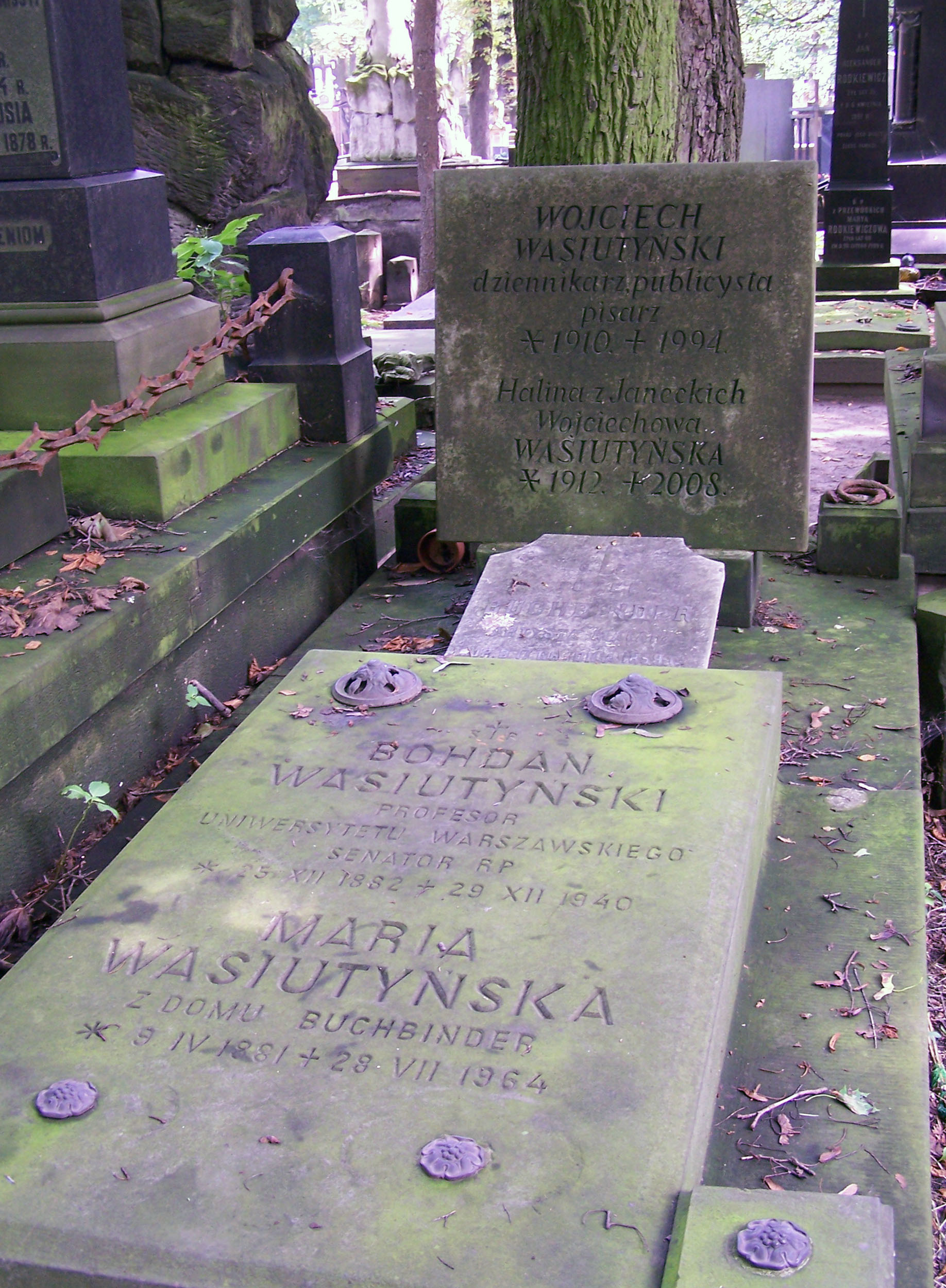 Grave of politicians Bohdan Wasiutyński and Wojciech Wasiutyński at Powązki Cemetery in Warsaw, Poland